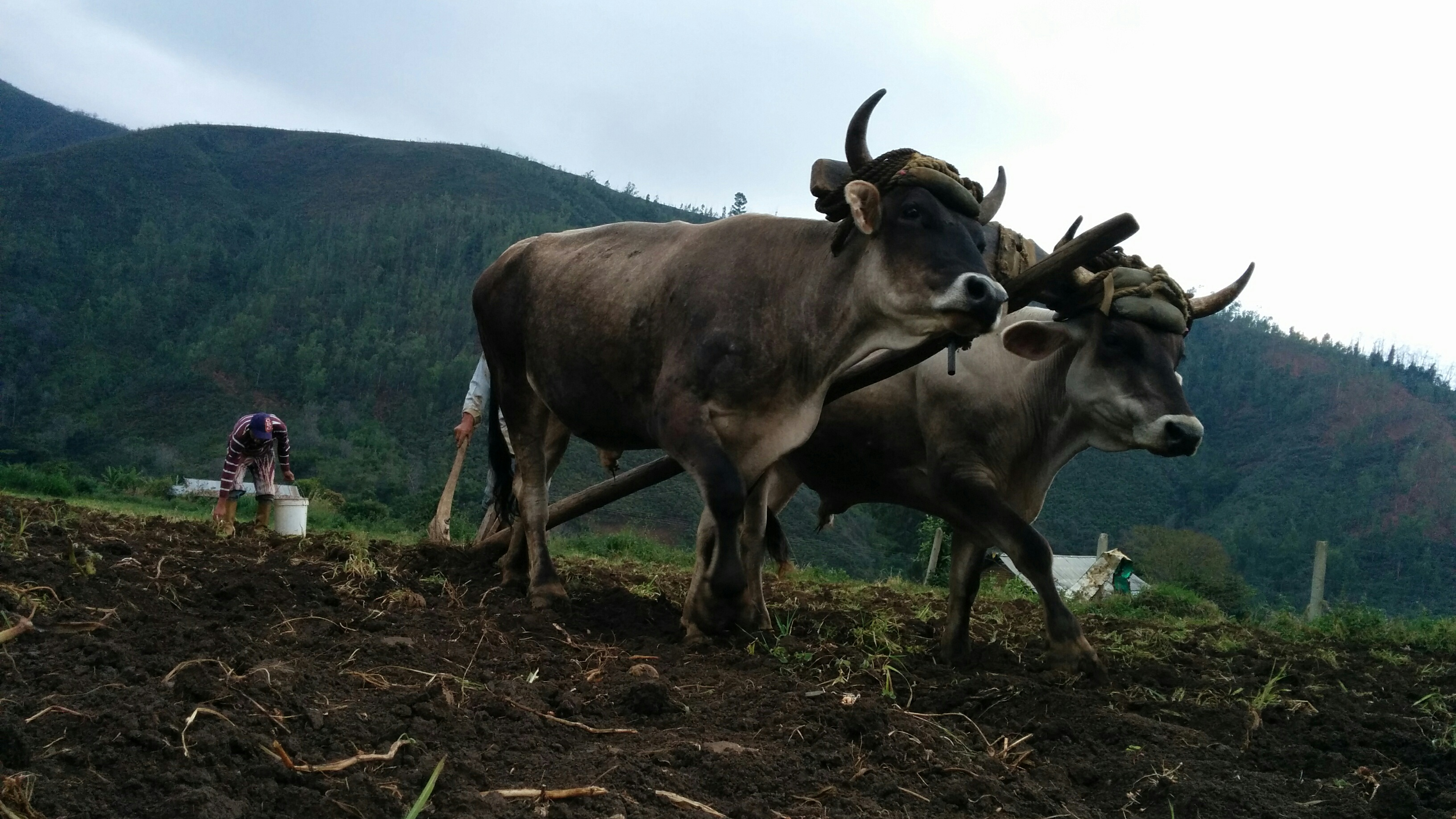 Cosecha de papas, Trujillo- Venezuela